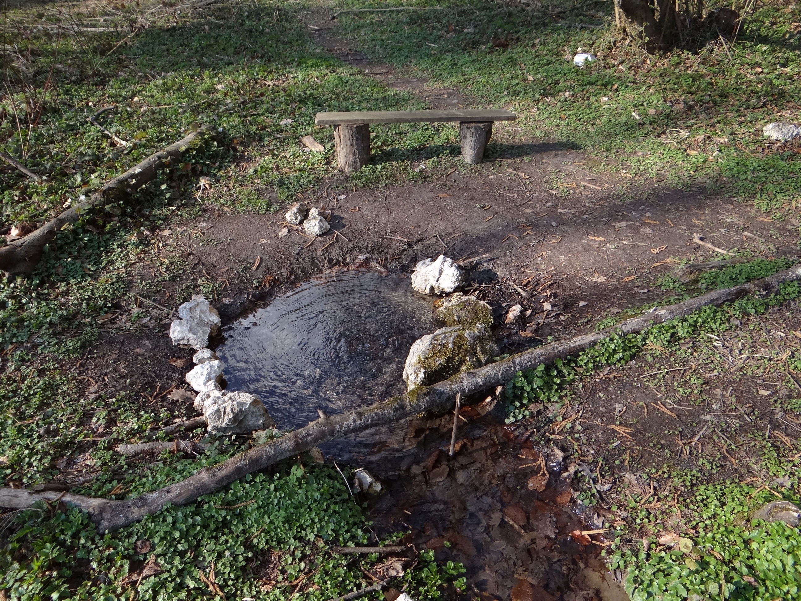 Źródło w wąwozie Półrzerczki